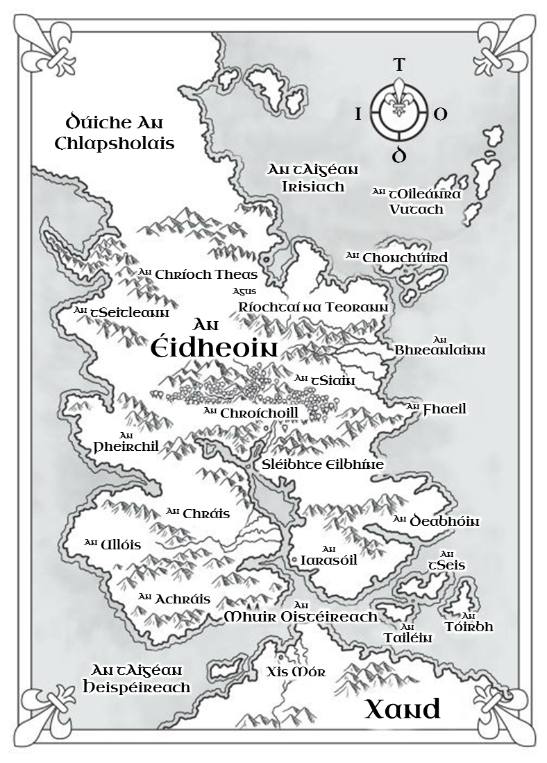 Léarscáil as Gaeilge d'Eion na Sraithe 'Shadowmarch' le Tad Williams